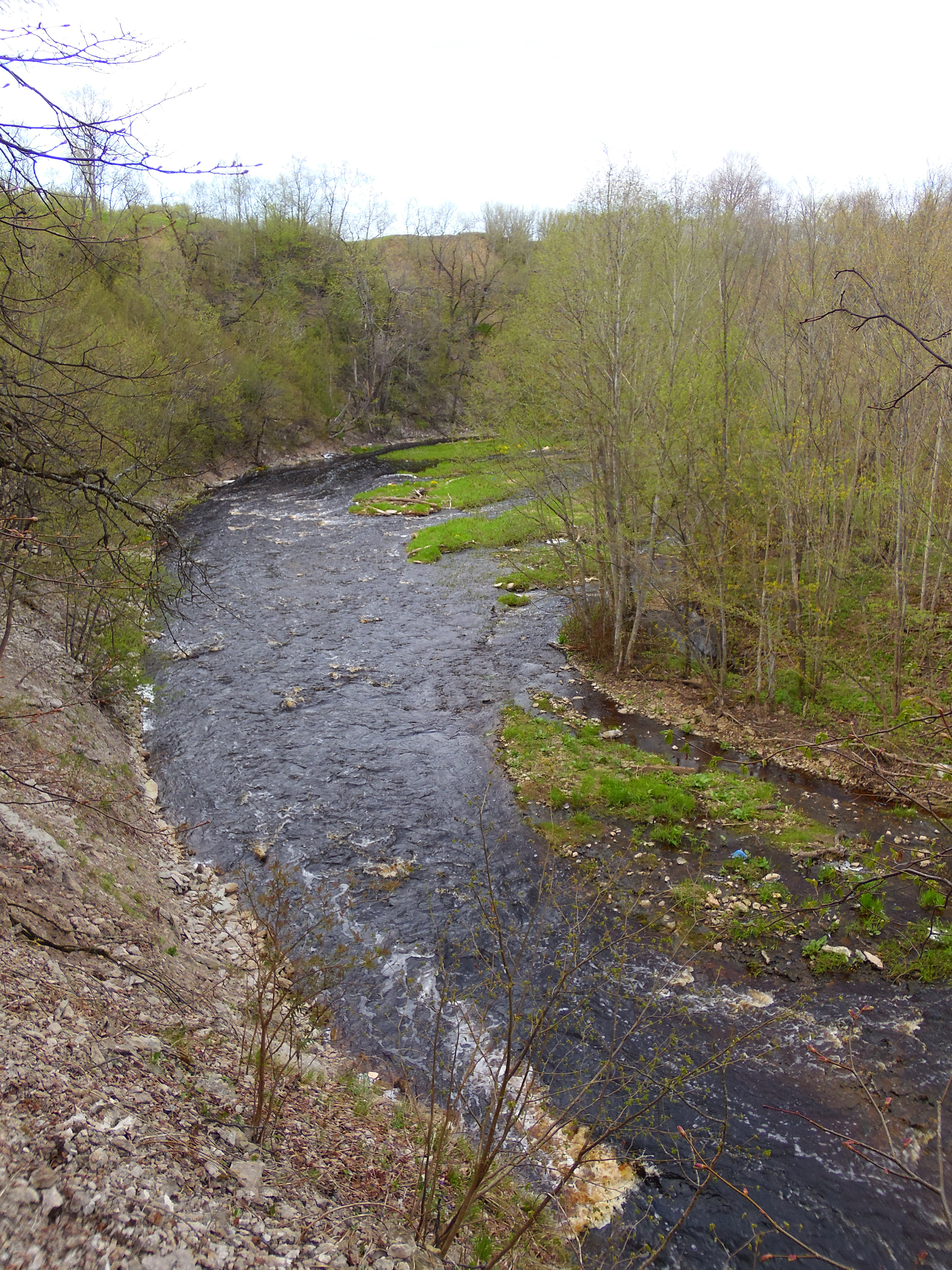 Каньон реки Лава около автомобильного моста, Кировский район This image is related to the protected area of Russia number 4710117